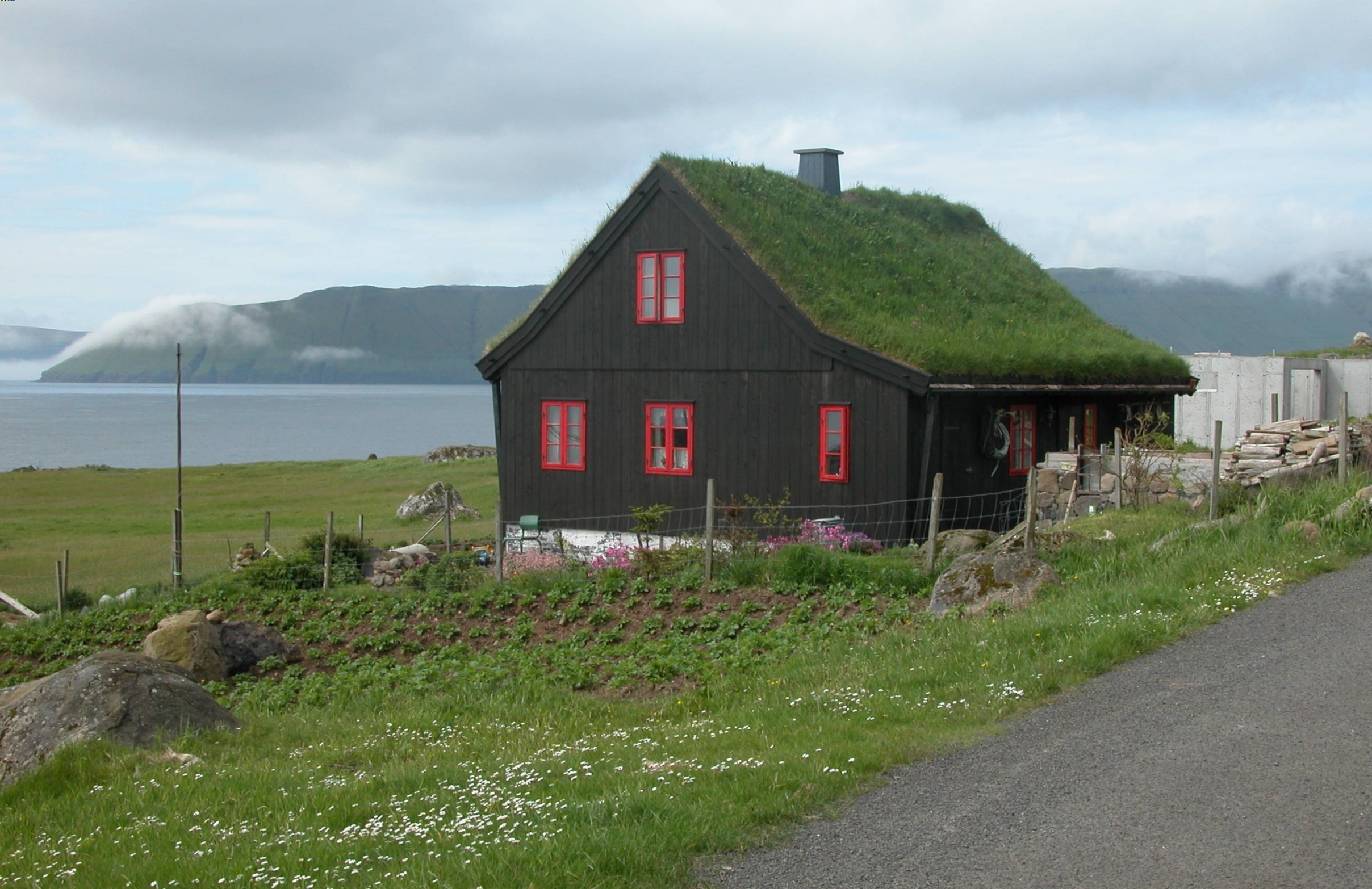 Kirkjubøur on Streymoy, Faroe Islands